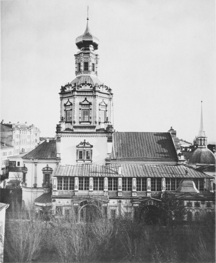 Богоявленский монастырь в Китай-городе. 1882 год.